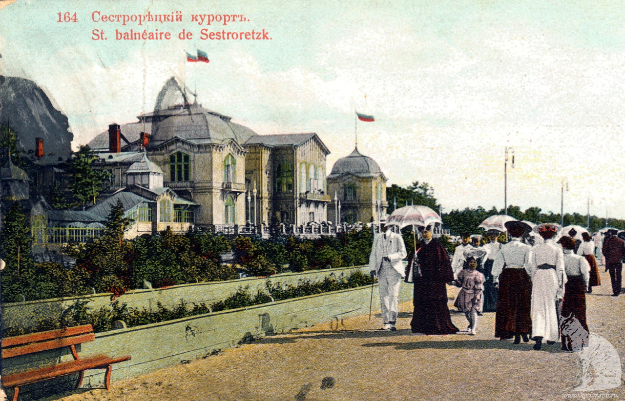 Сестрорецкий курзал